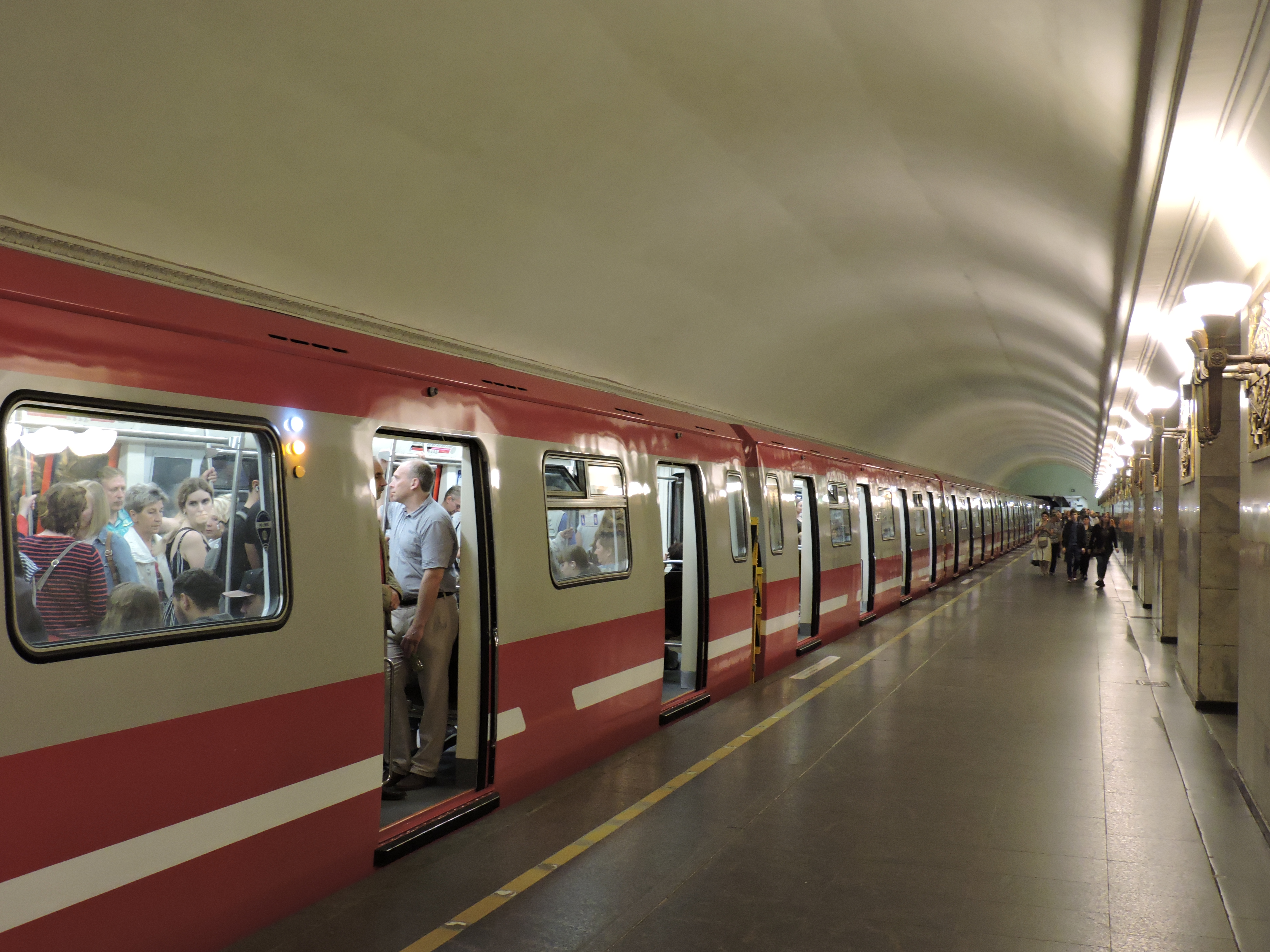 Поезд "Юбилейный" на "Владимирской"